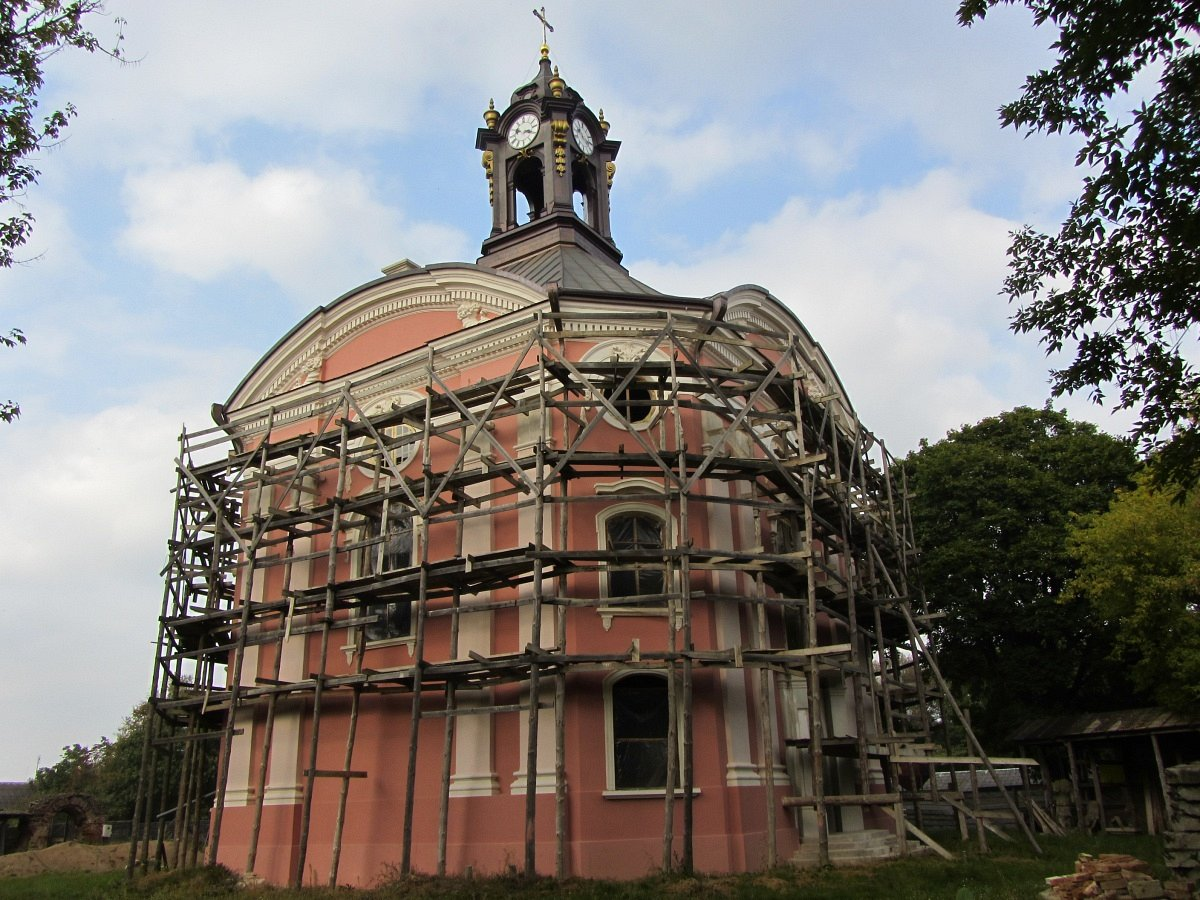 Краявіды Воўчына